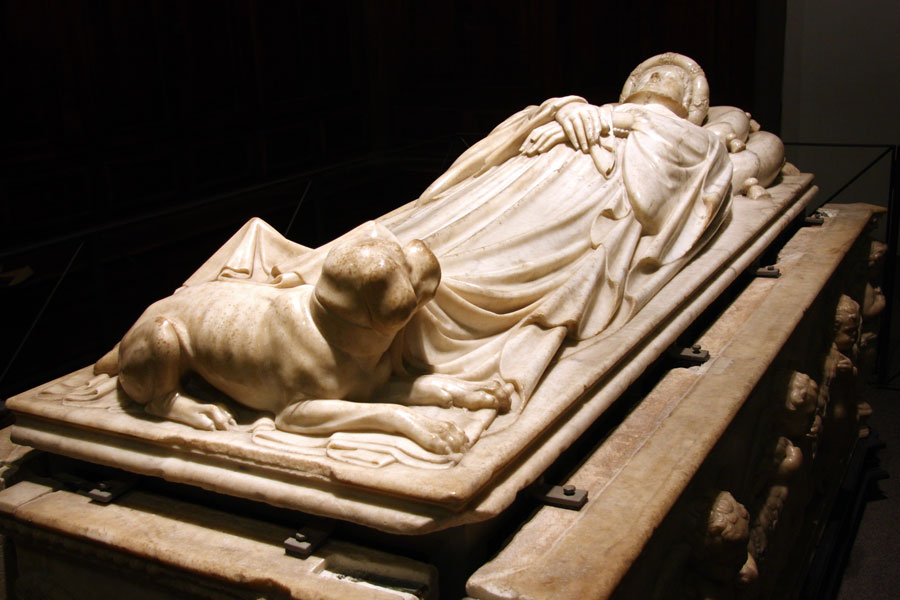 Monumento Funebre a Ilaria Del Carretto nella Cattedrale di San Martino a Lucca